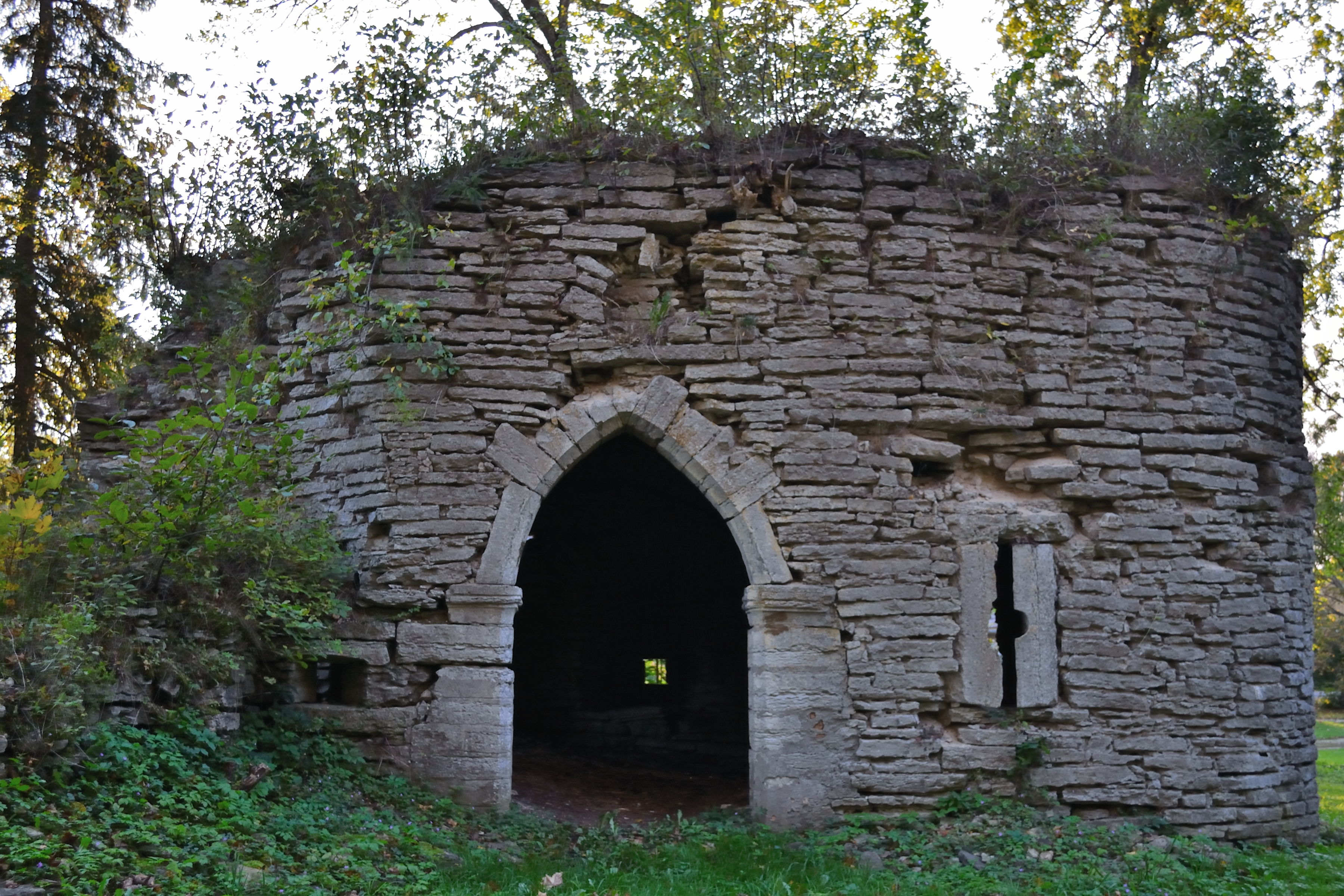 Vääna linnuse varemed, 19.saj